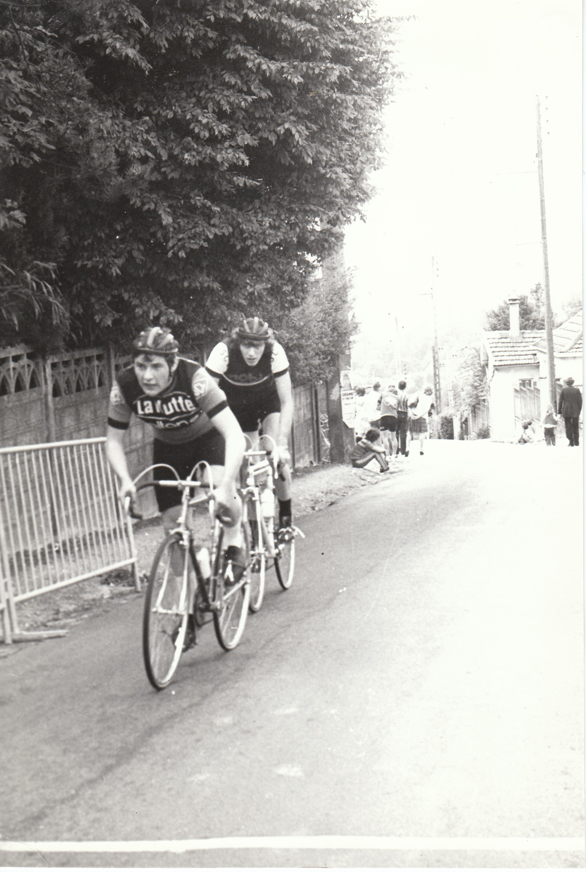 Crosne (91) 1974 Union Cycliste Longjumelloise